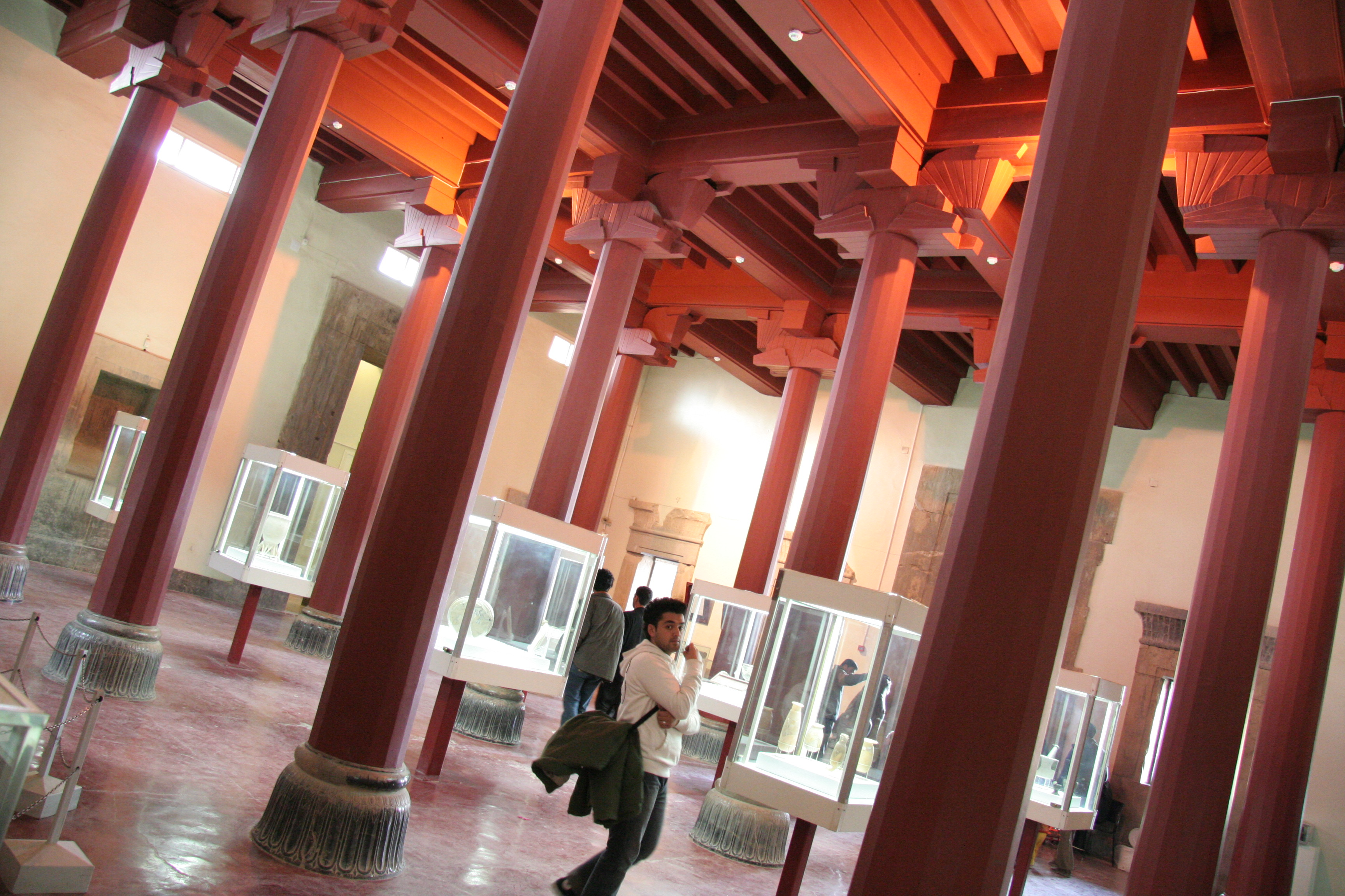 موزهٔ تخت‌جمشید.